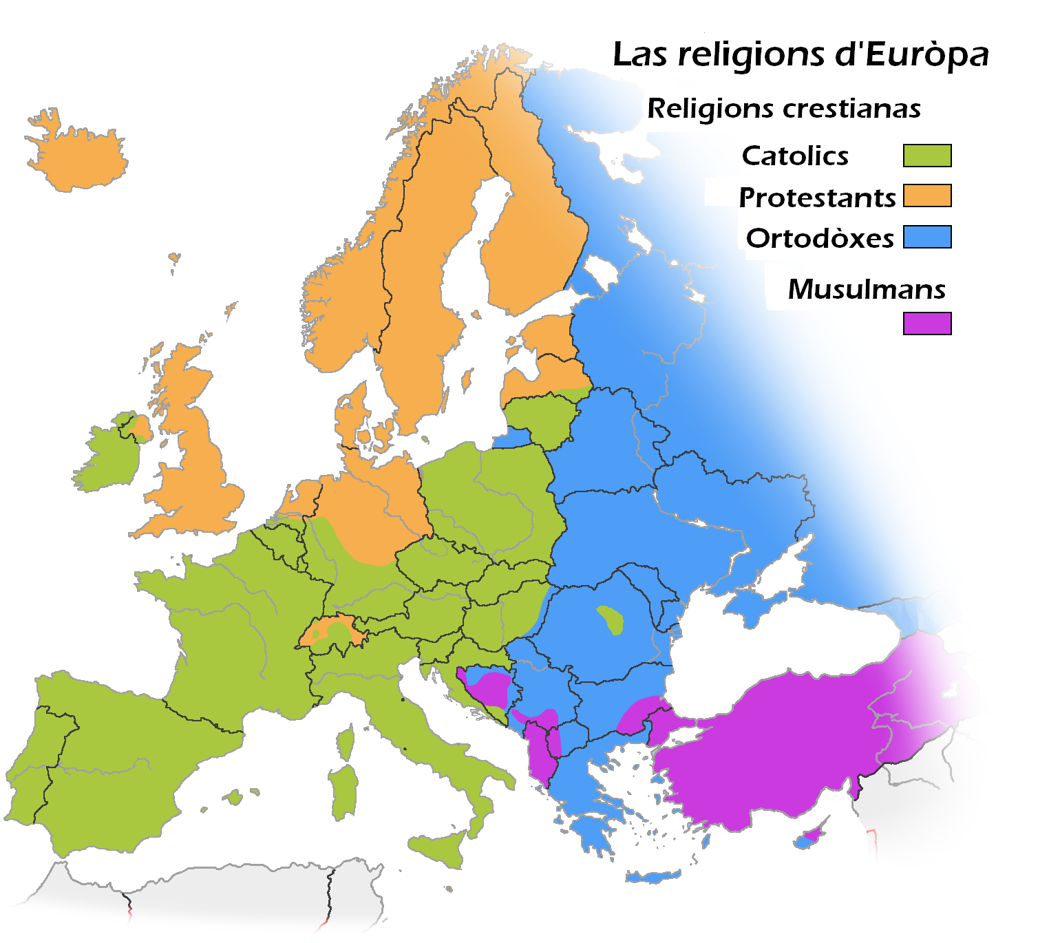 Traduccion d'un imatge commons liure de drech per Cedric31